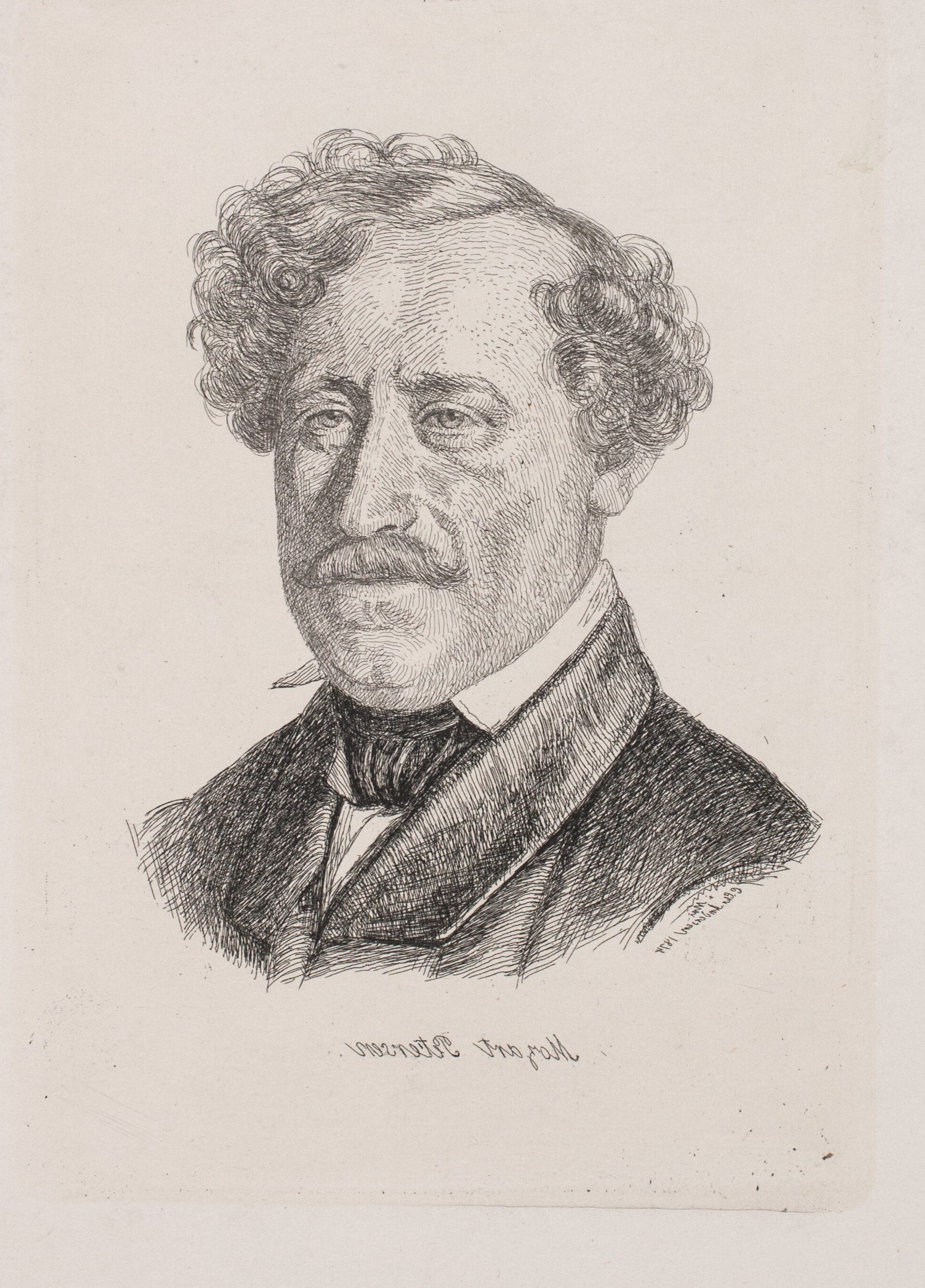 Christopher Knudsen Mozart Petersen (1817-1874), Danish clarinetist. Etching